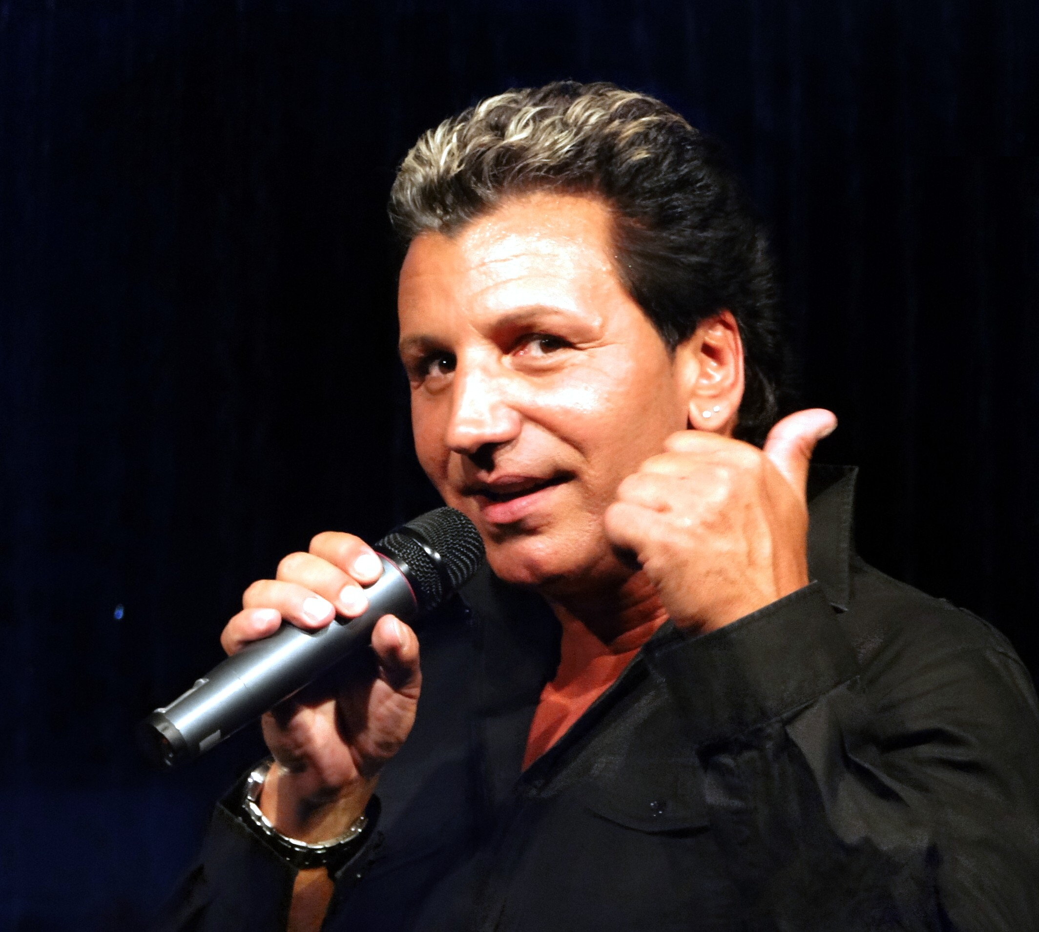 Der deutsche Schlagersänger Oliver Frank bei einem Konzert im August 2010